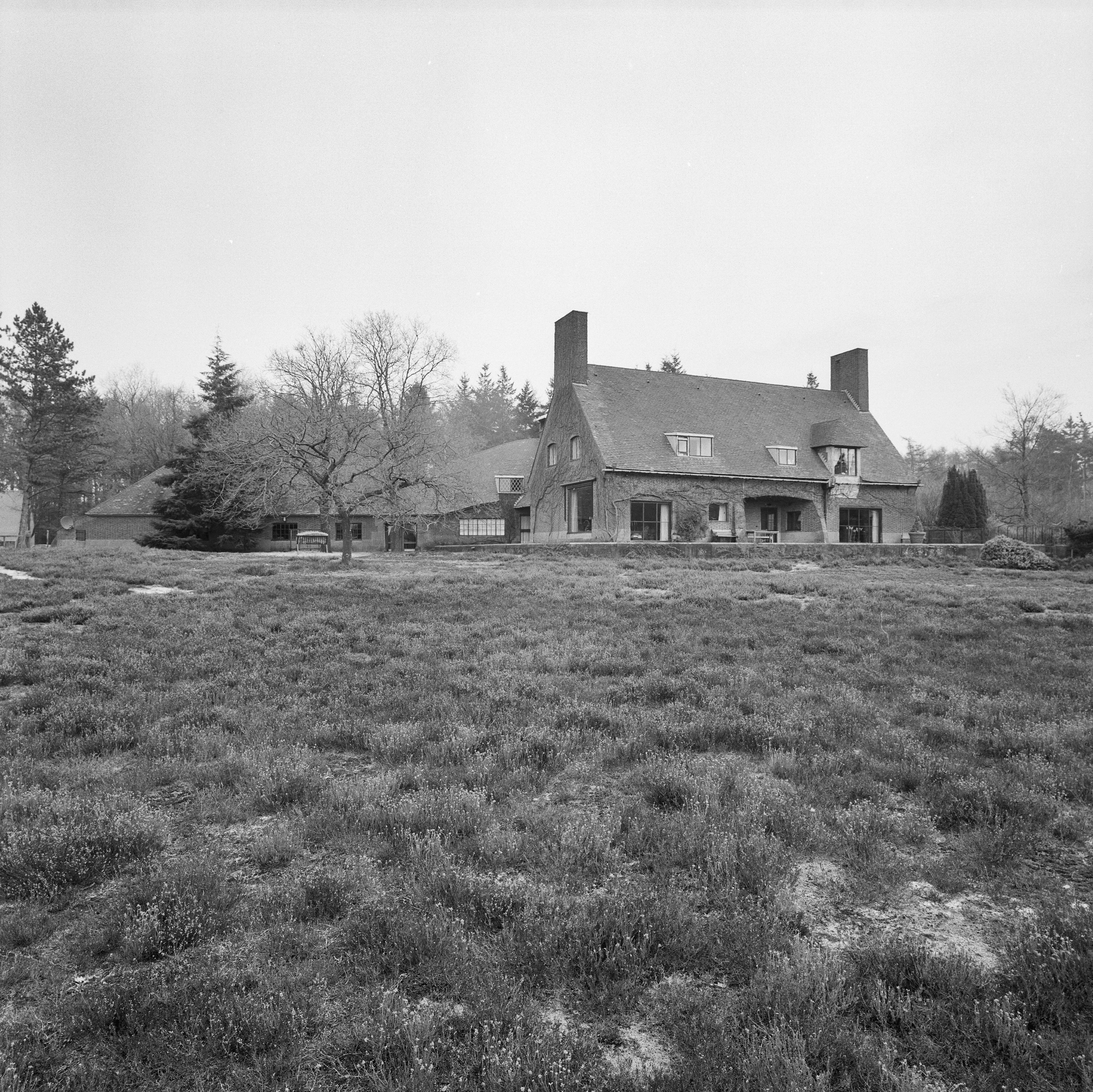 Landhuis Noorderheide. Overzicht voorgevel en linker zijgevel en dienstvleugel